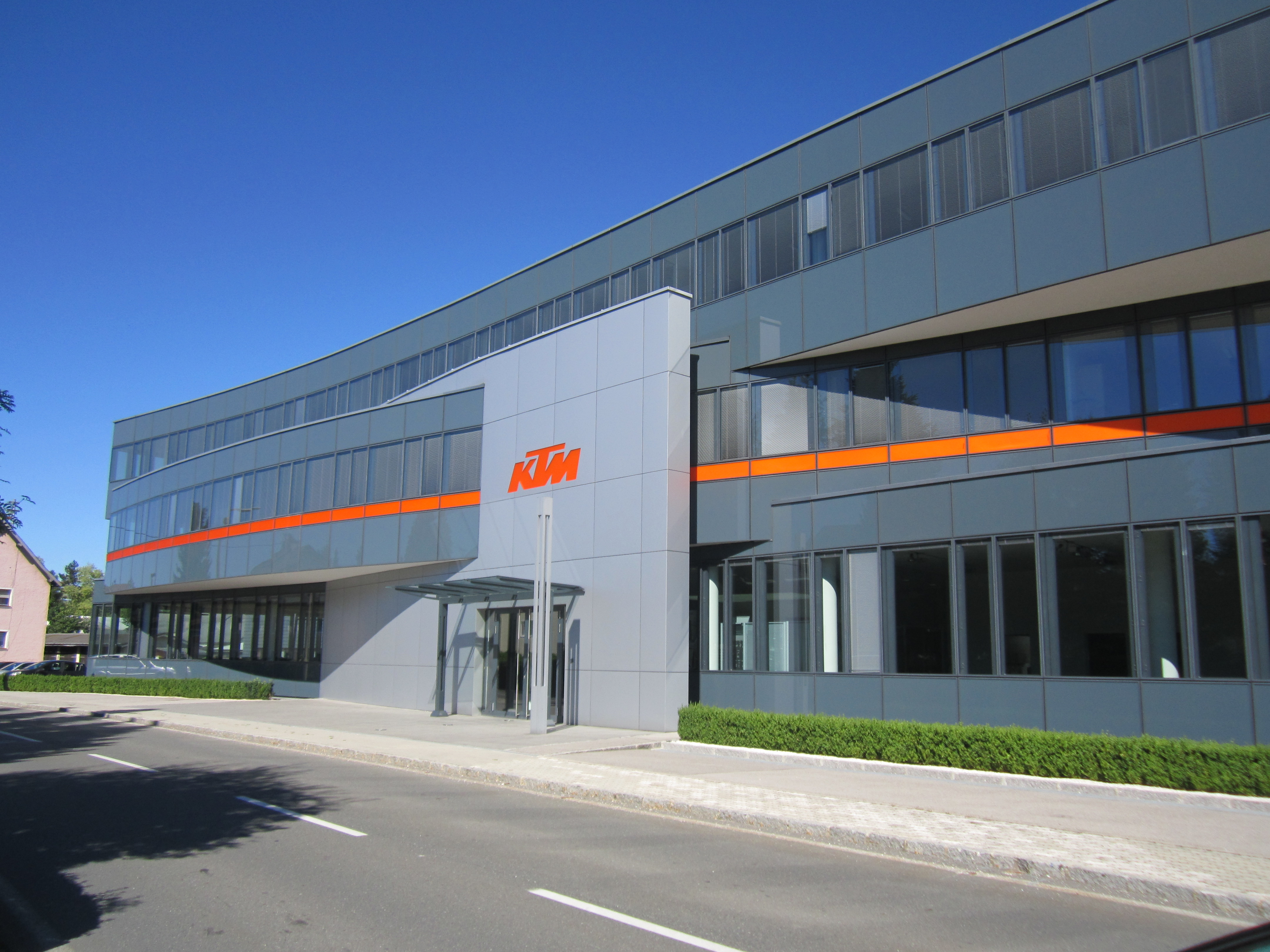 La sede della KTM agosto 2012 - Mattighofen